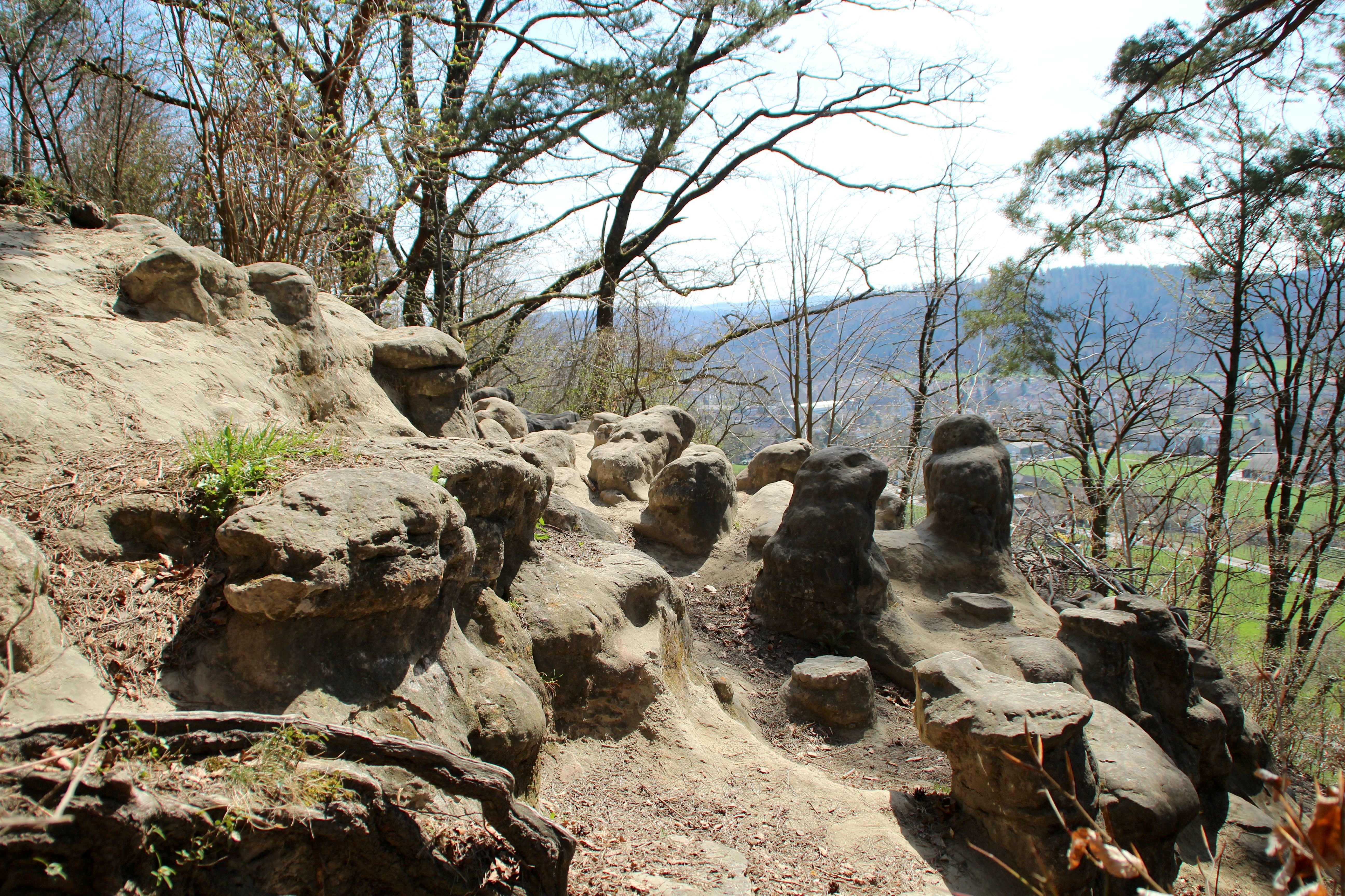 Chöpfi